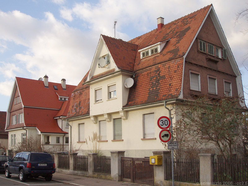 Gebäude Liebigstraße 8 in Heilbronn